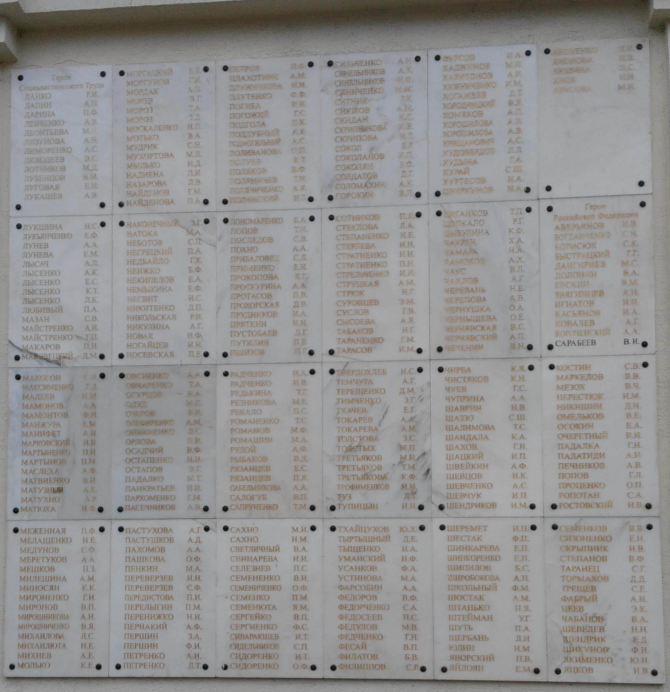 Мемориальная доска с именами Героев Социалистического Труда Кубани и Адыгеи. Краснодар 2017